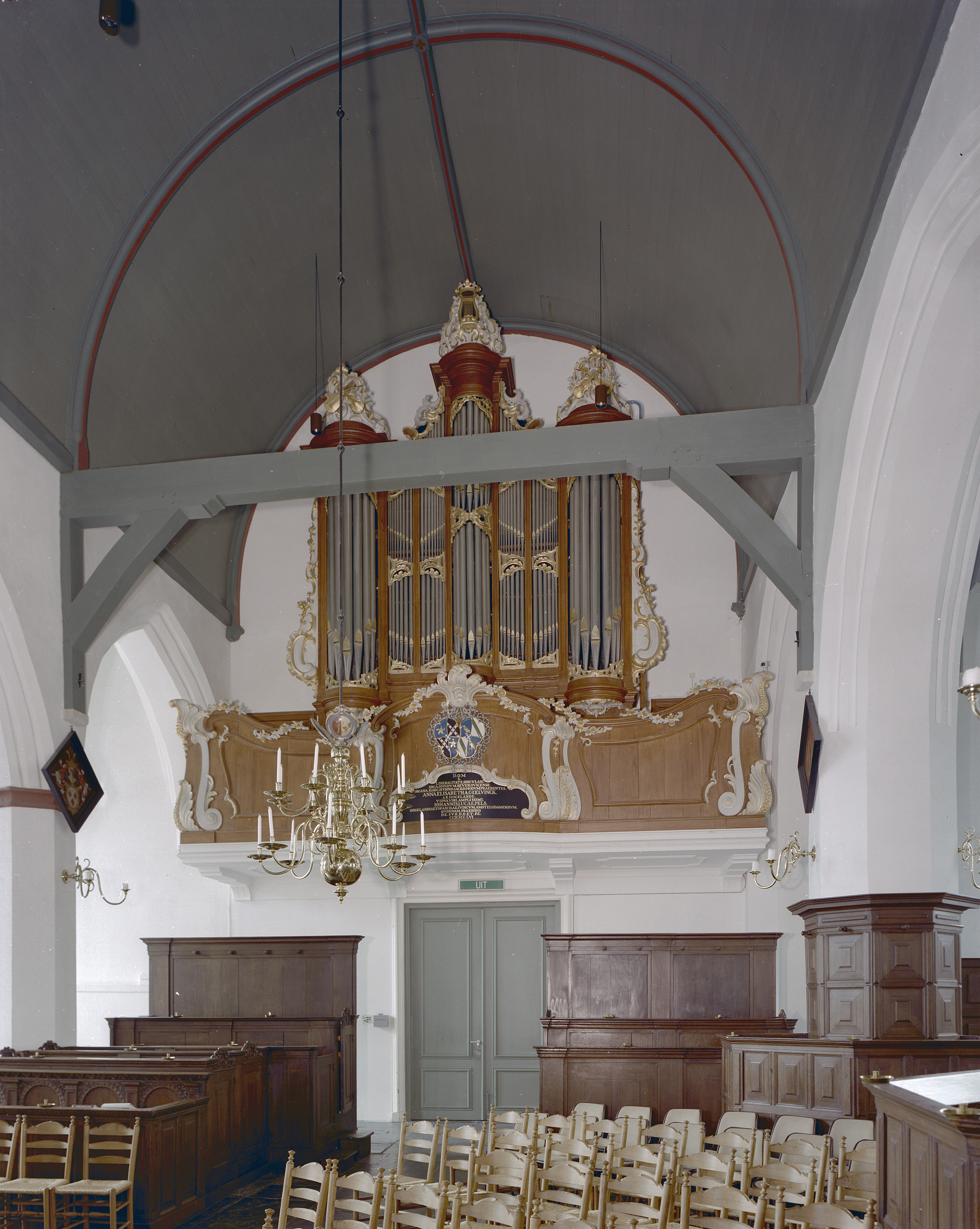 Nederlands Hervormde Kerk: Interieur, aanzicht orgel, orgelnummer 175 (opmerking: Gefotografeerd voor Het Historische Orgel in Nederland 1726-1769, bladzijde 237)